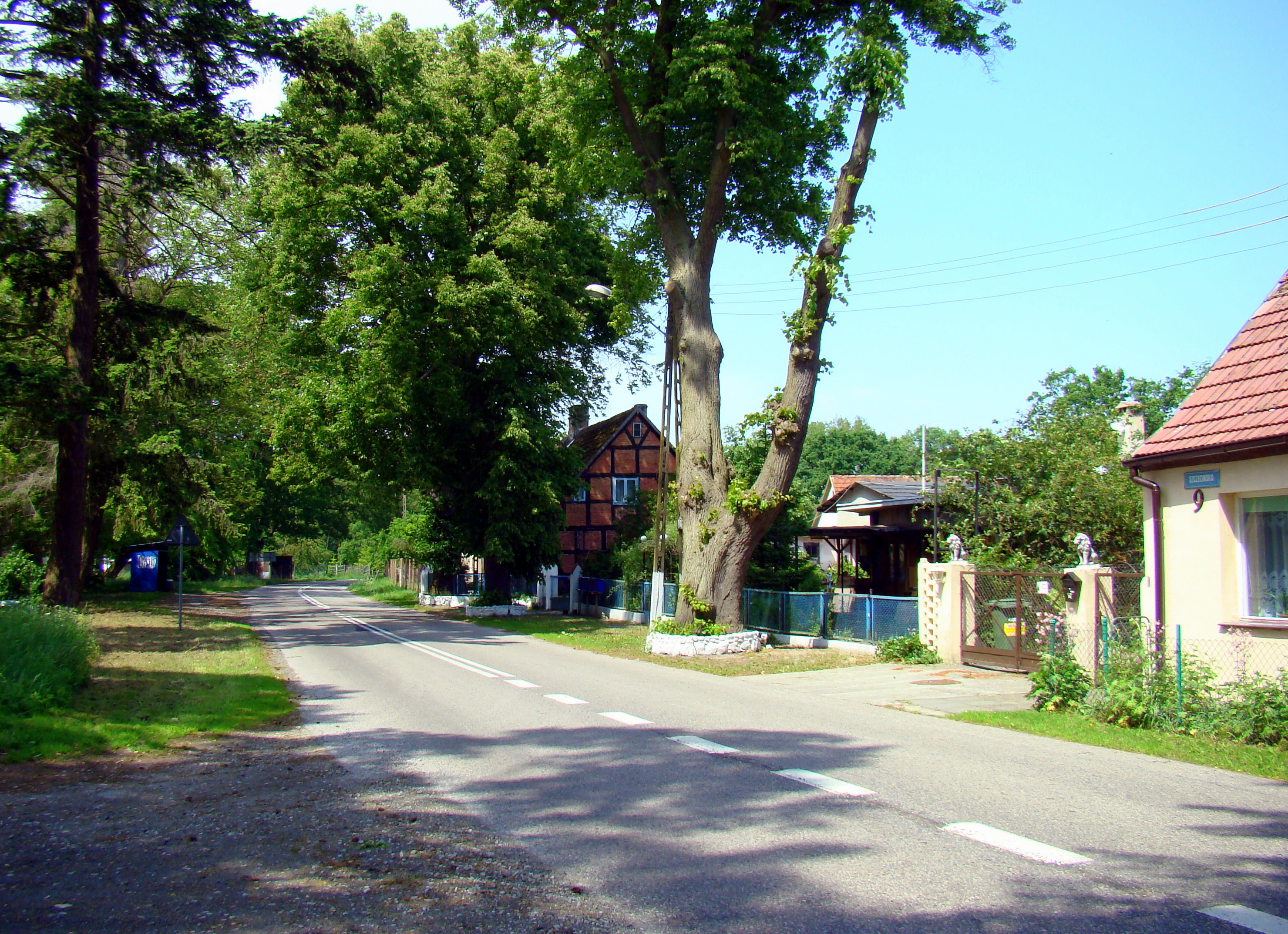 Karszno-Nowe Warpno (Województwo zachodniopomorskie), Polska